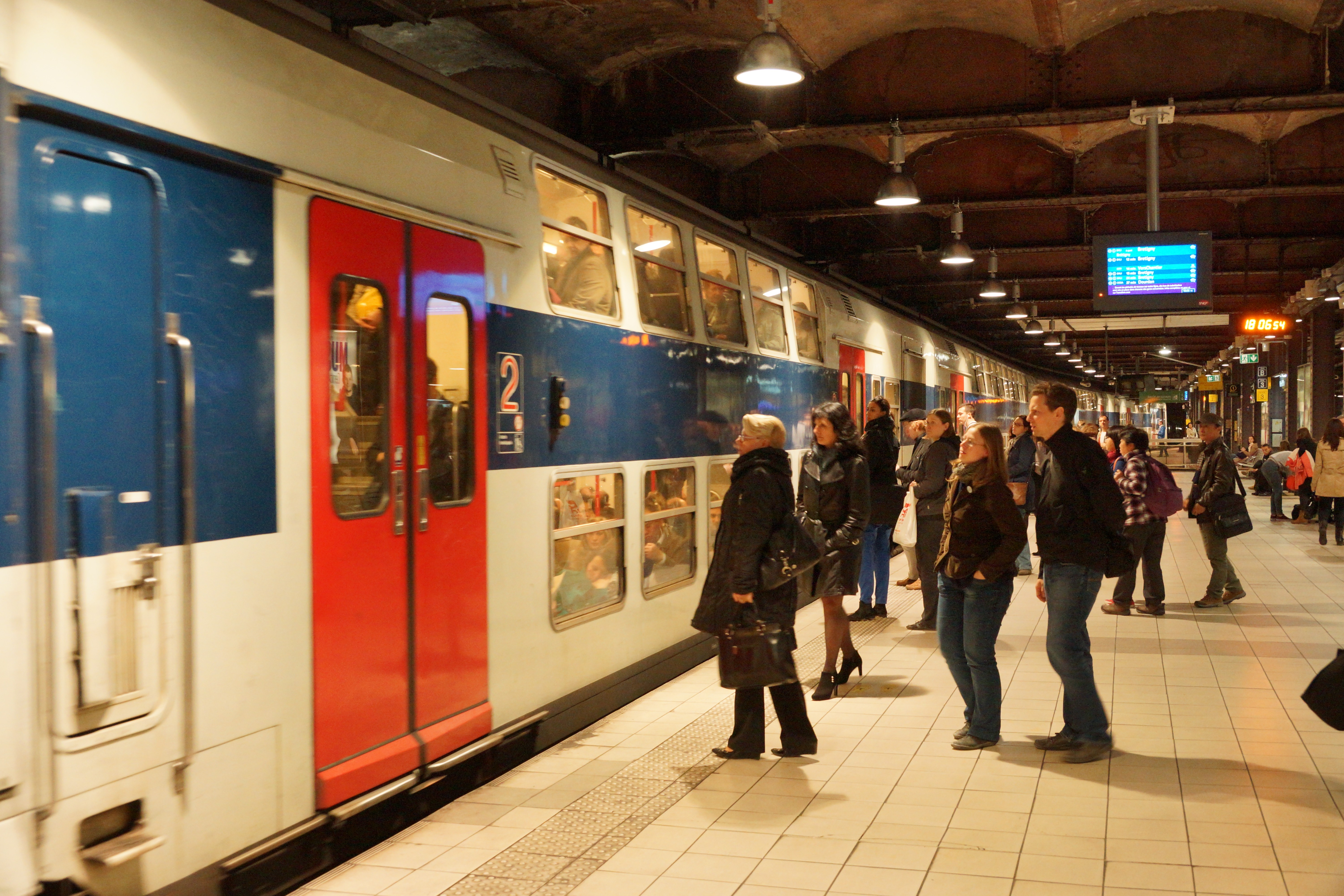 Gare du Musée d'Orsay, Paris, France.